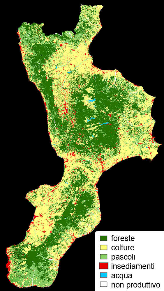 Distribuzione demografica e sfruttamento del territorio in Calabria